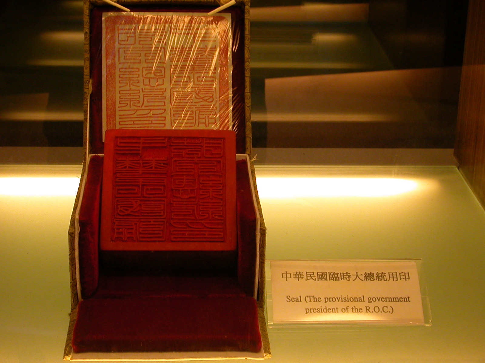 中華民國臨時大總統印，現藏臺北國父紀念館。 Bân-lâm-gú: Tiong-huâ Bîn-kok Lîm-sî Tuā-tsóng-thóng ìn, hiān tsông î Tâi-pak Kok-hū Kí-liām-kuán.